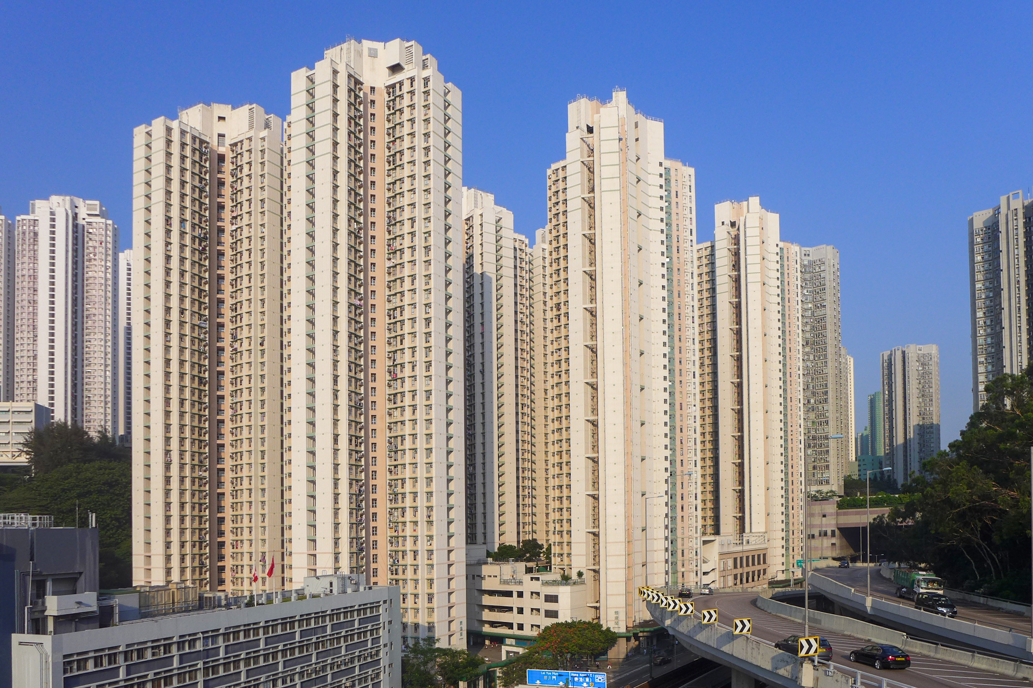 Lei On Court